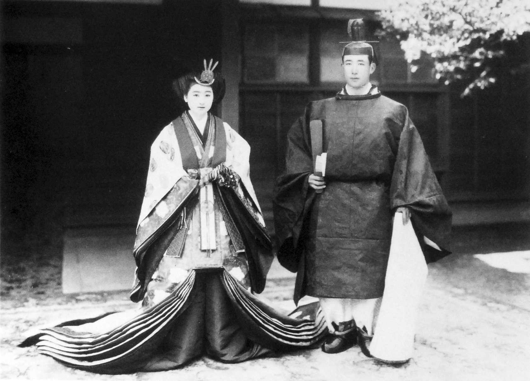 北白川宮永久王(Kitasirakawa-no-miya Nagahisa)と祥子(Sachiko)妃の結婚式。